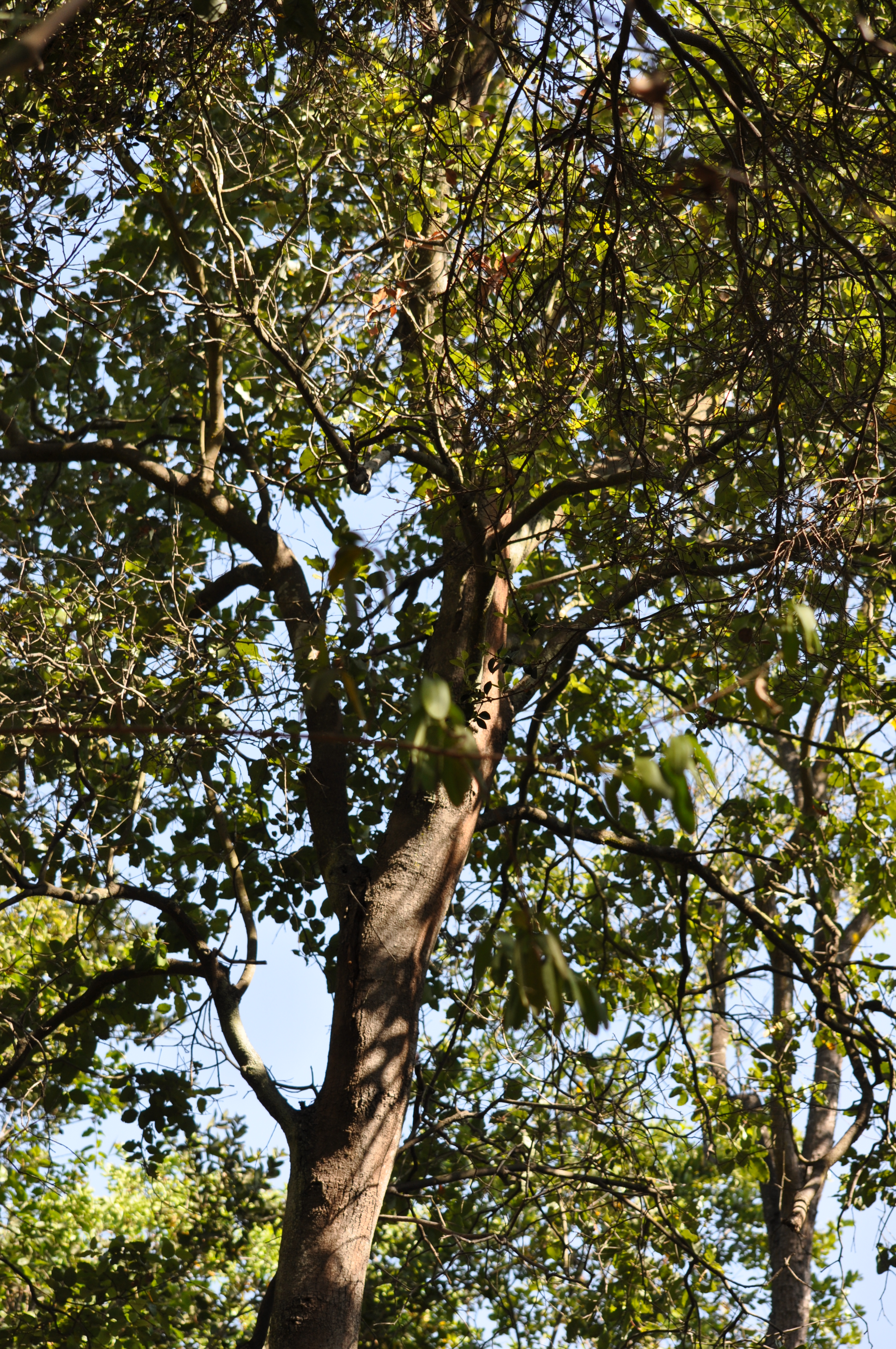 Cryptocarya alba (Peumo) en el parque nacional La Campana, Región de Valparaíso, Chile. Circuito La Canasta.